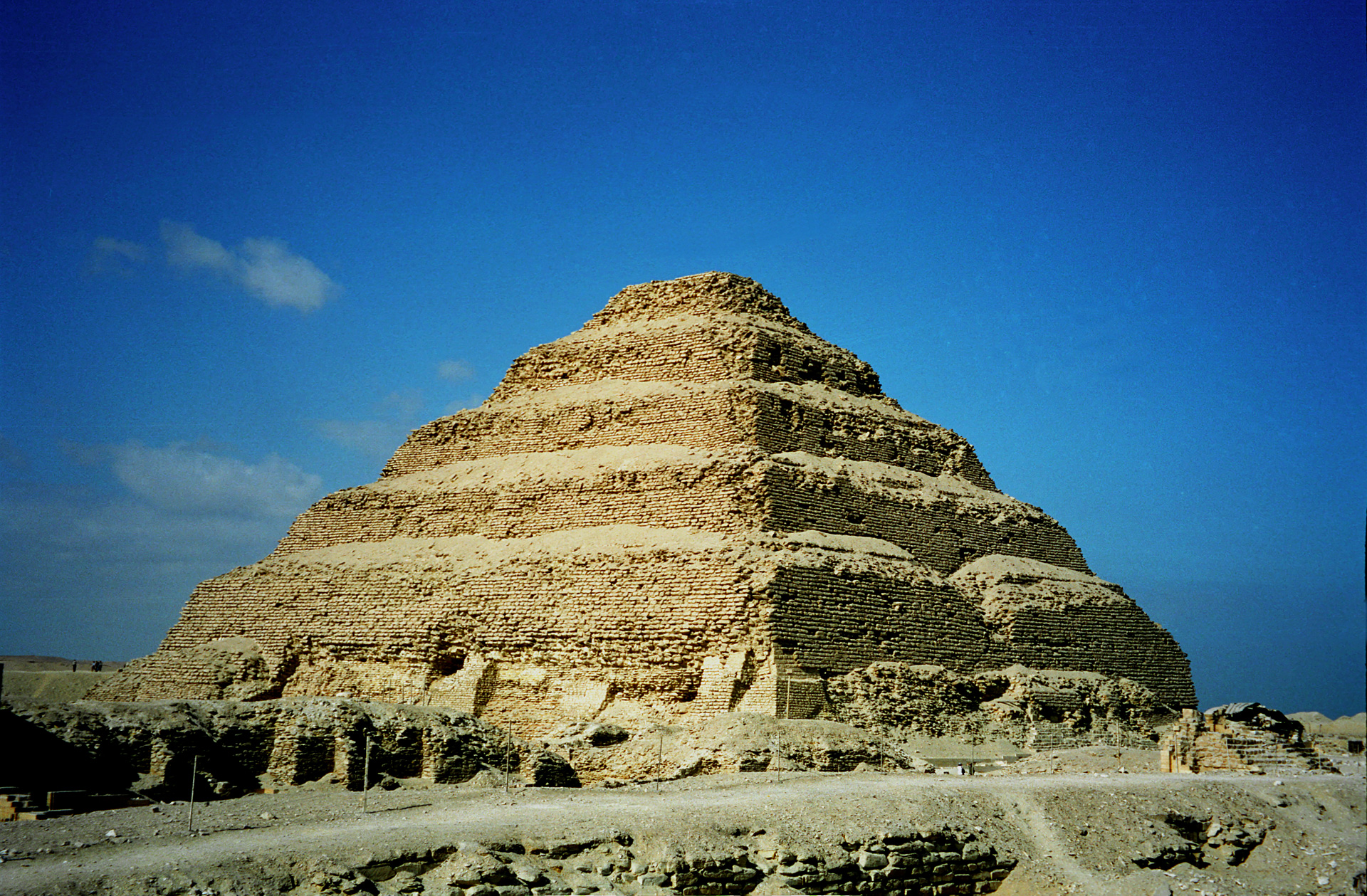 Djoser pyramid in Saqqara